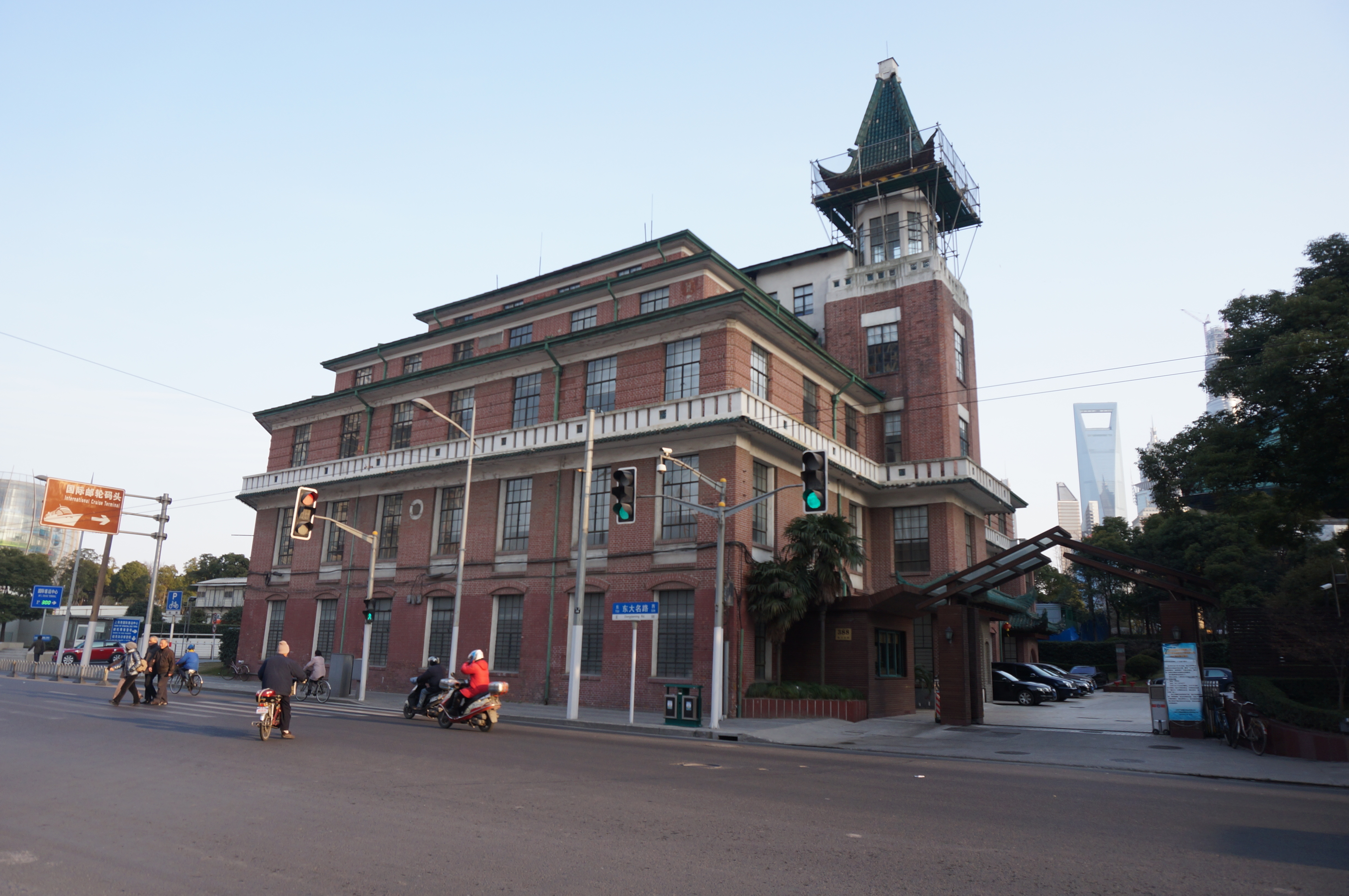 中文（中国大陆）: 上海市第二批优秀历史建筑——远洋运输公司